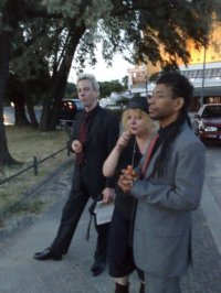 Nach einem Opernbesuch stehen Angela C. Popp, Bernhard Beutler und Joaquin LaHabana vor der Philharmonie in Berlin